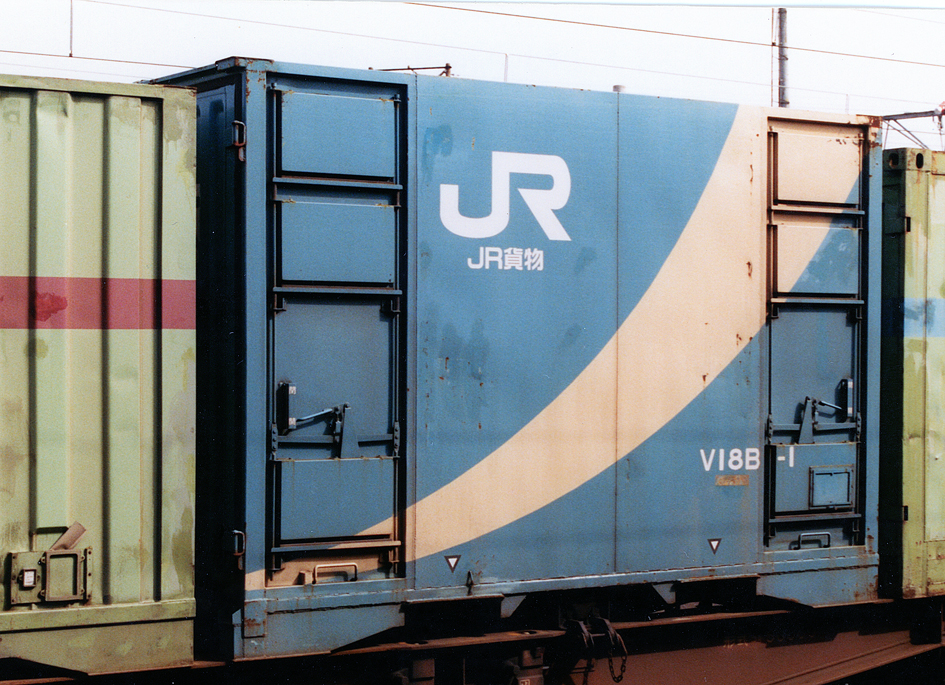 JR貨物 V18B-1